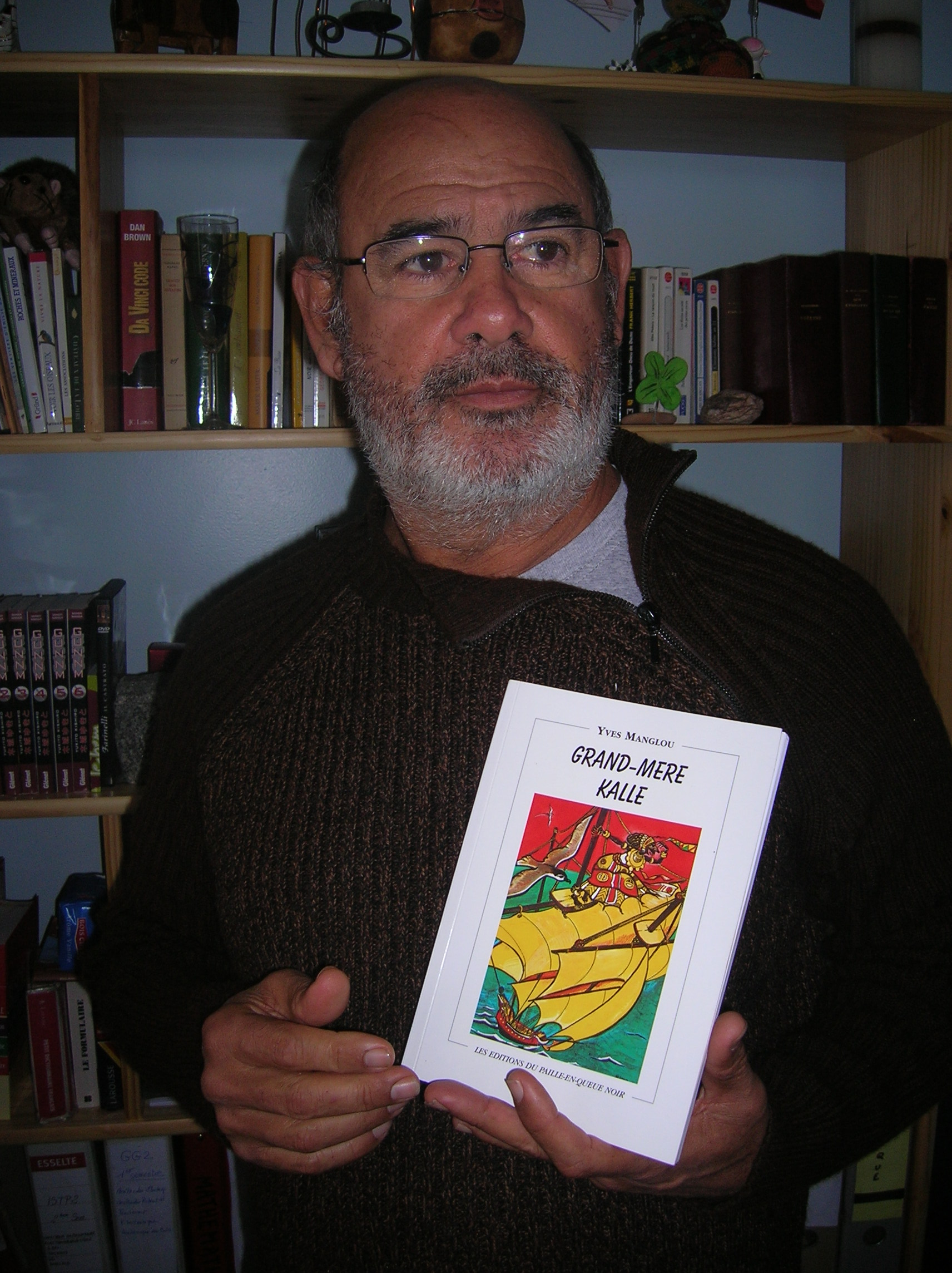 Yves MANGLOU et son livre : Grand-Mère Kalle photo : Emilie MANGLOU (Paris 2006)